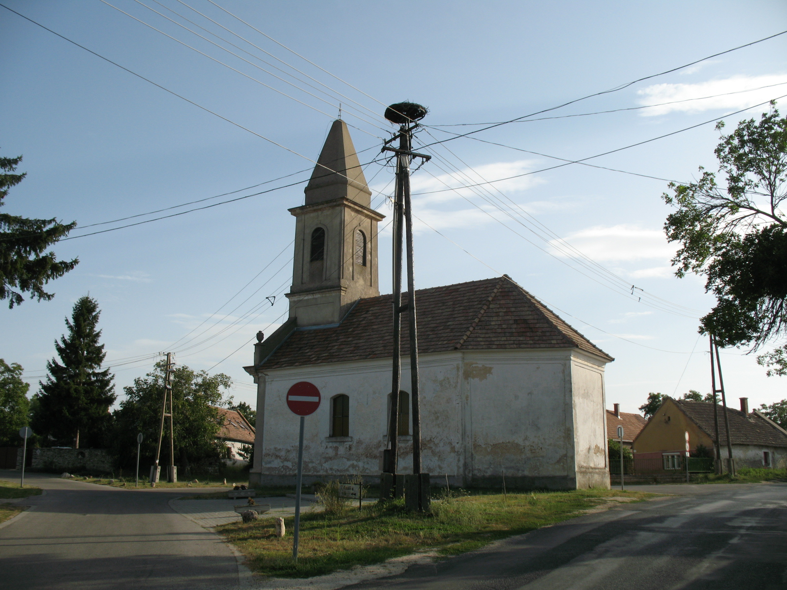 Mencshely